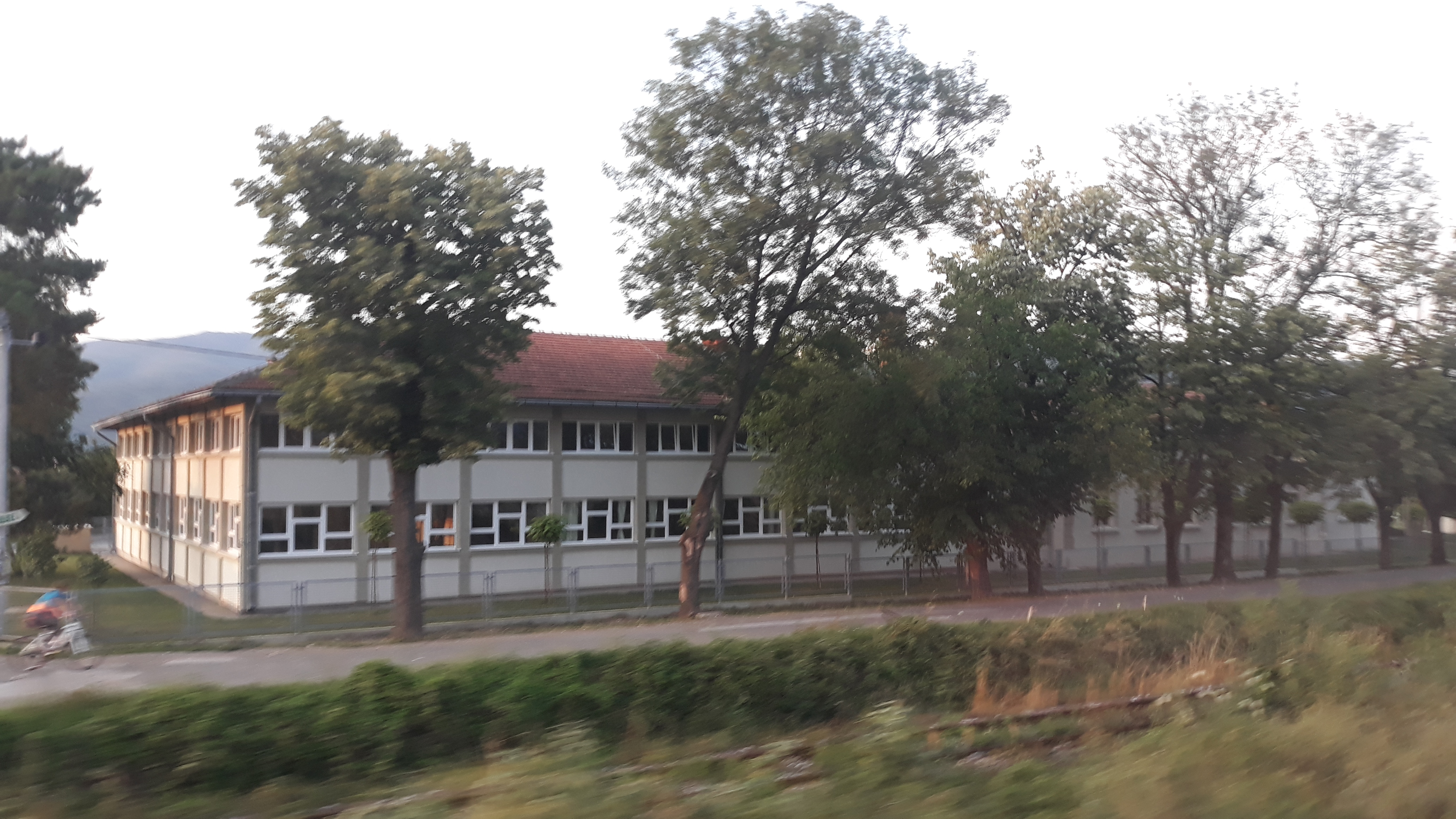 Основна школа у Врњцима